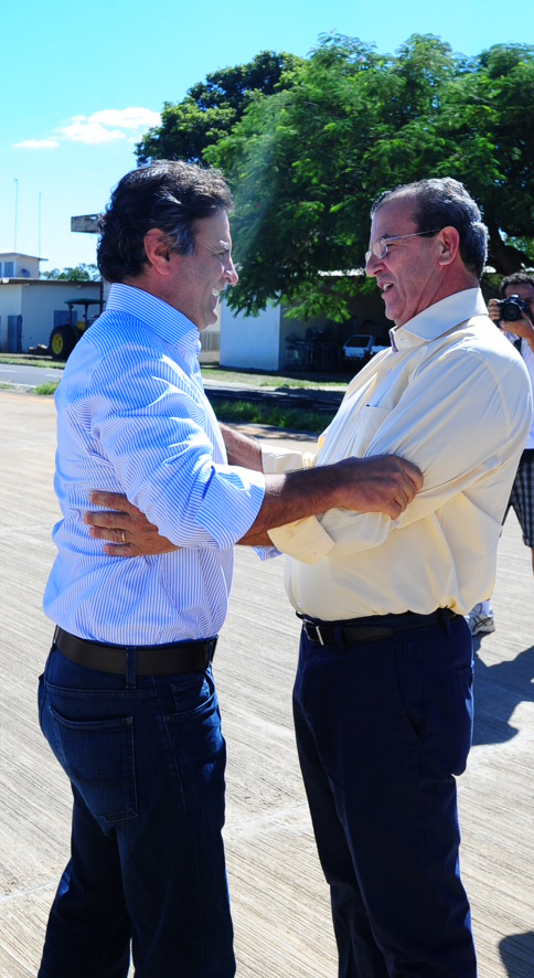 Aécio Neves e Dilador Borges se encontram em Araçatuba em 2014.